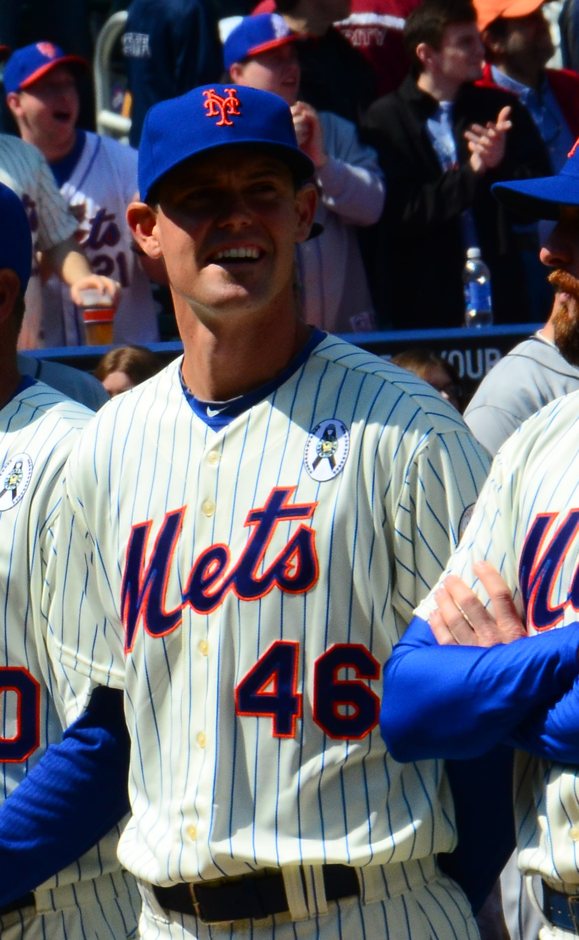 Greg Burke